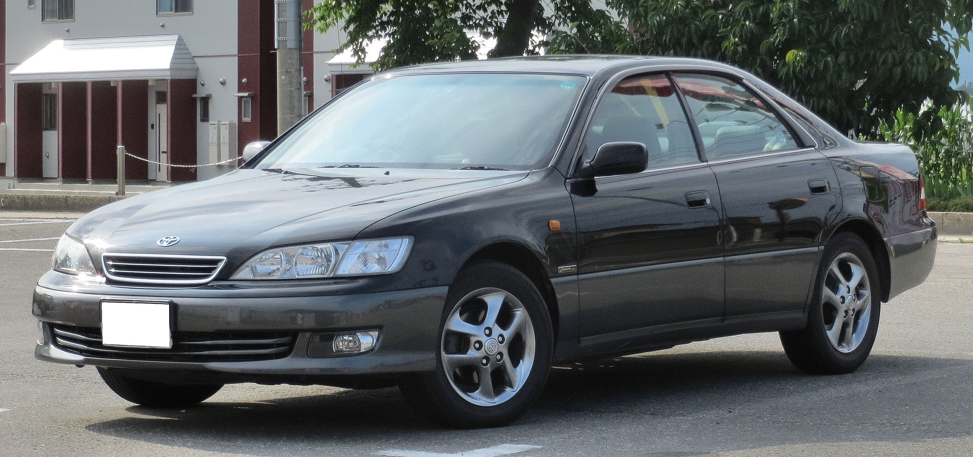 トヨタ ウィンダム 3.0G クルージングエディション 後期型